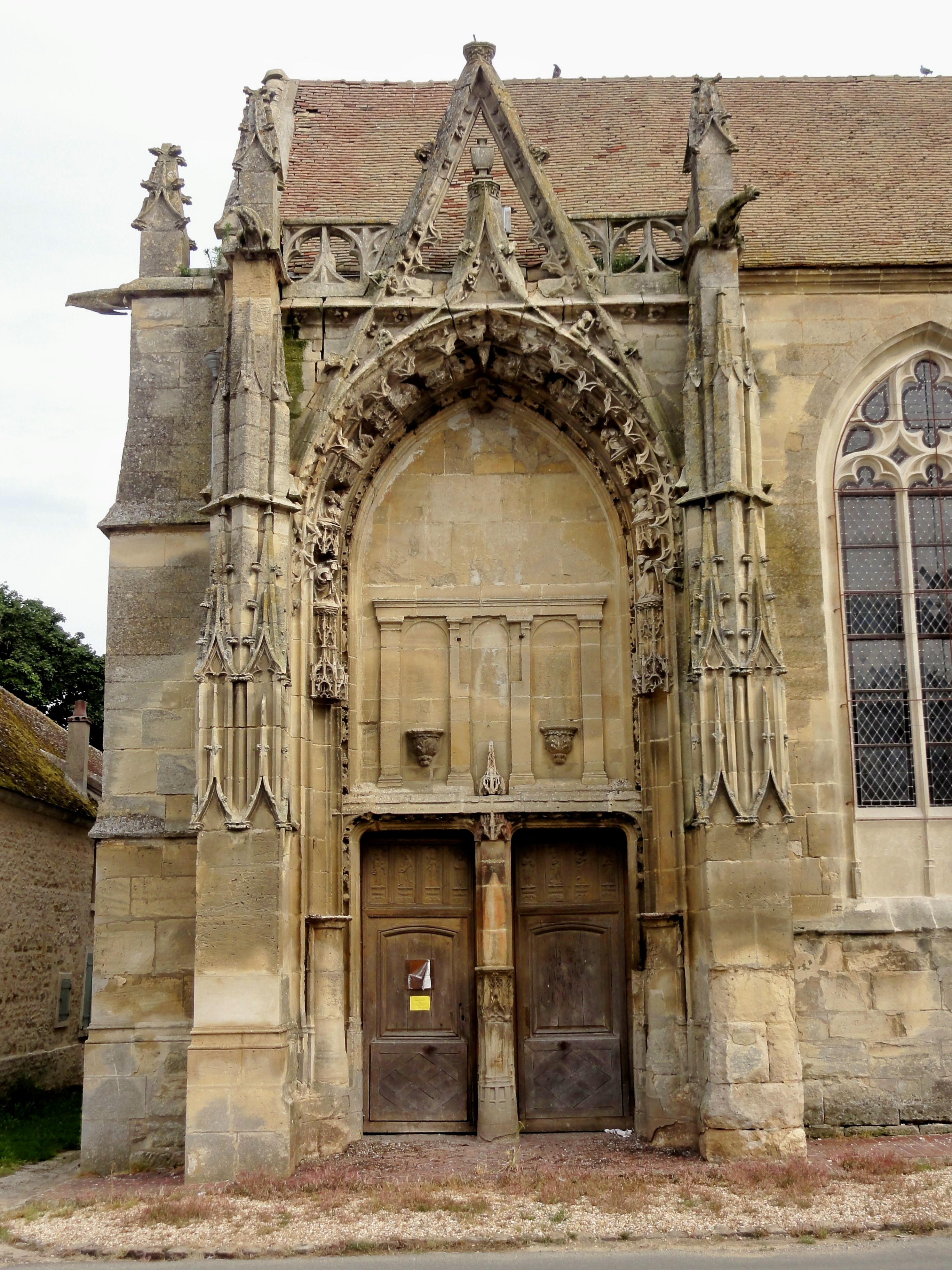 Portail.